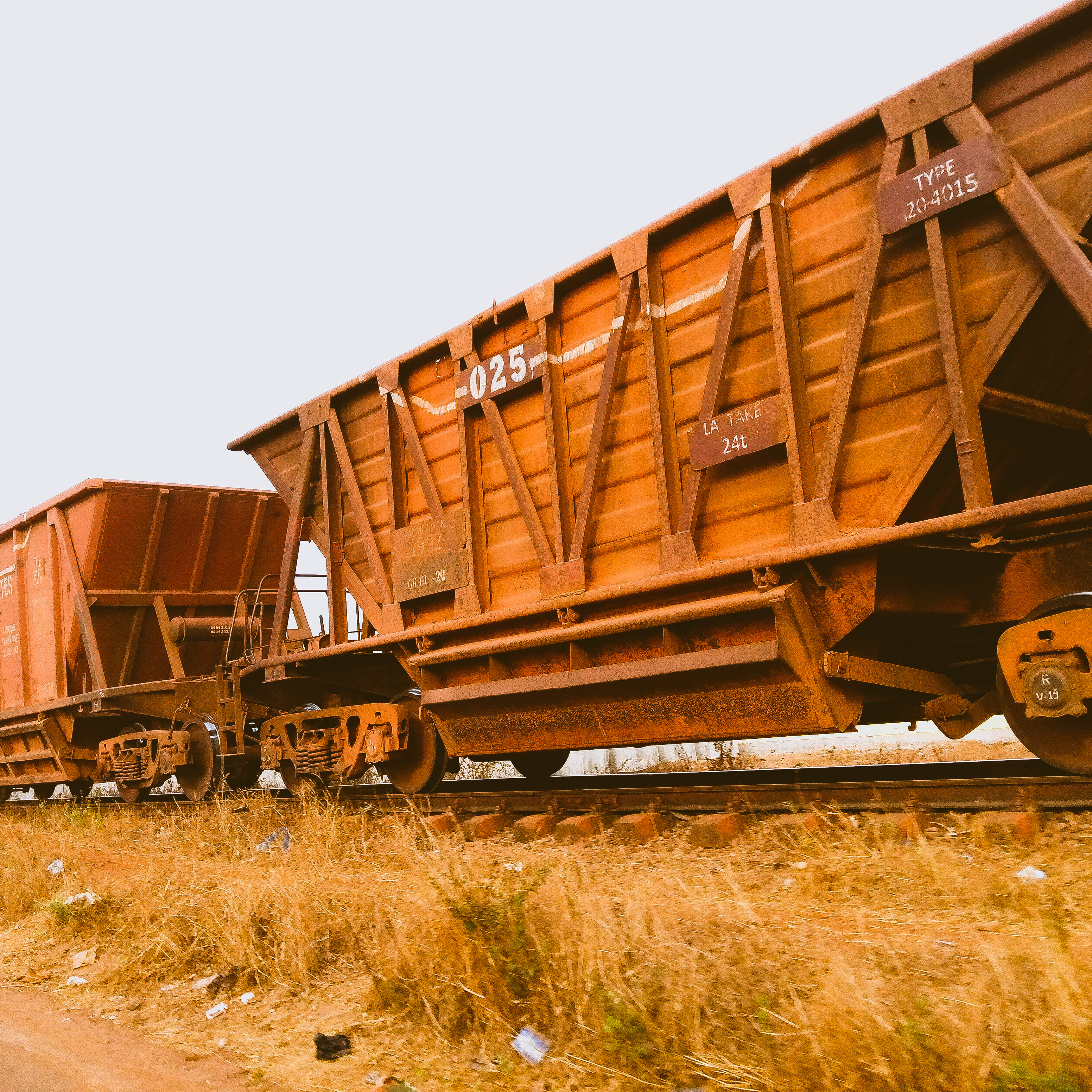 Wagons de transport de bauxite This is an image with the theme "Africa on the Move or Transport" from: Guinea